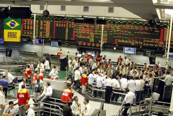 Ação dos Traders na Bolsa de Valores de São Paulo - 2009